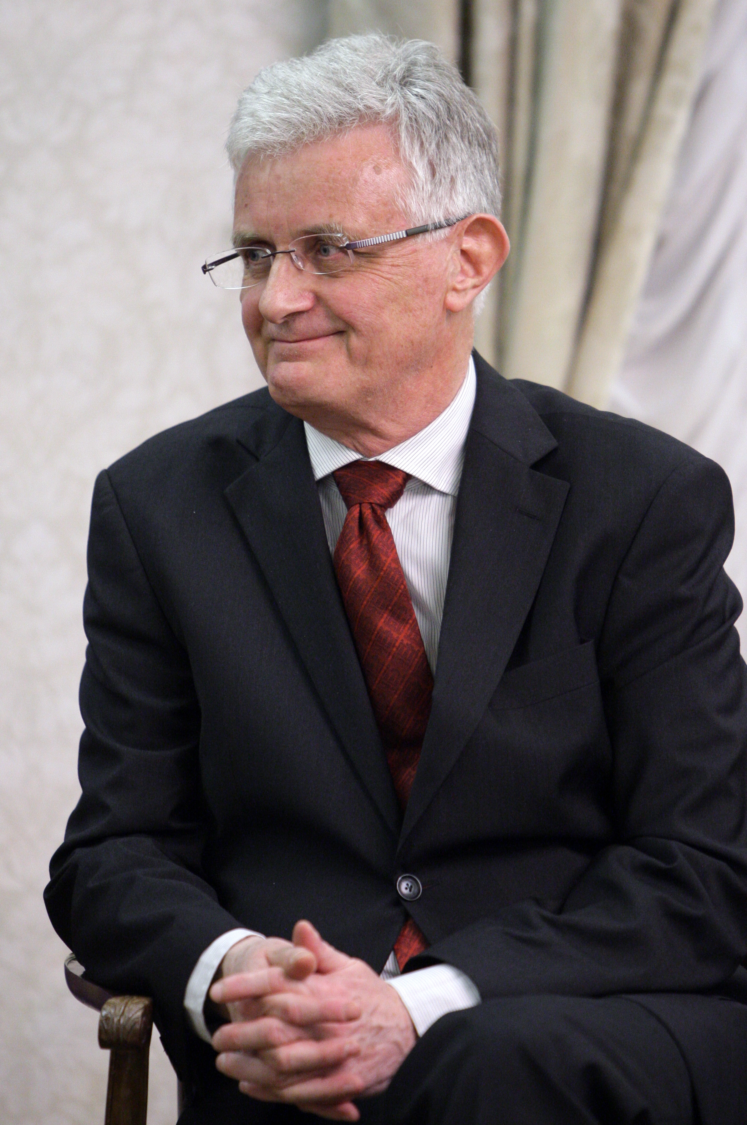 Председатель Государственного собрания Республики Словения П. Гантар на встрече с Председателем Правительства Российской Федерации В. В. Путиным